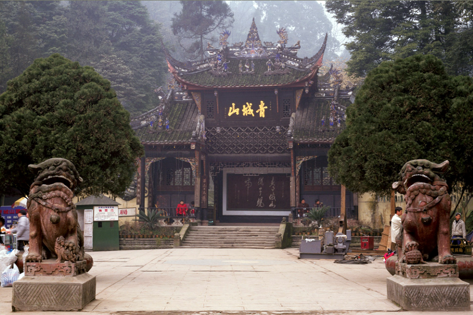 青城山山门。青城山是中国道教发祥地之一，相传为东汉张道陵讲经传道之所。